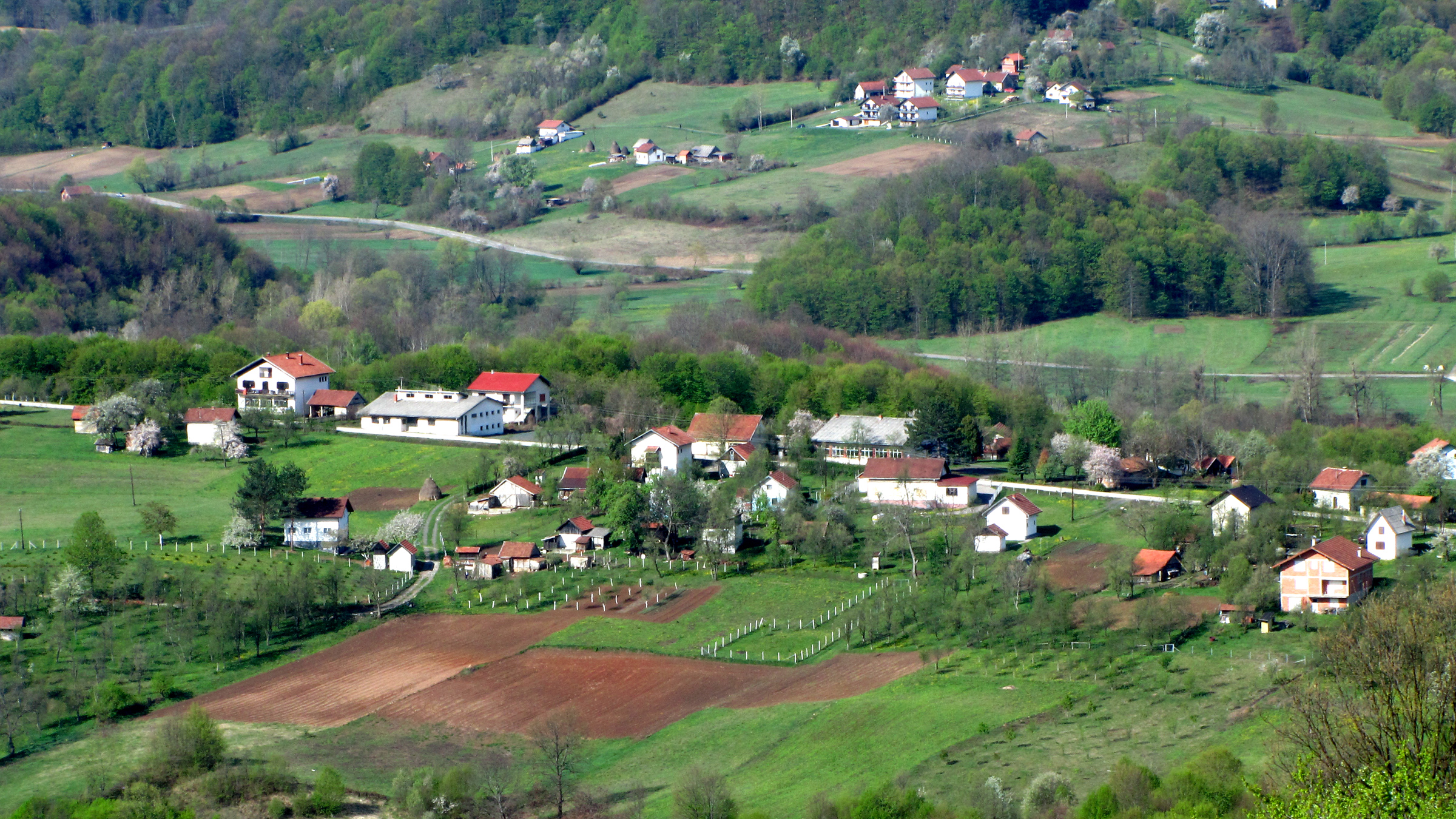 Растуша